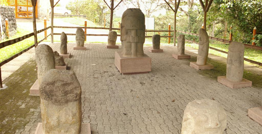 entrada al Bosque de los Idolos en el Parque Arqueologico San Agustin